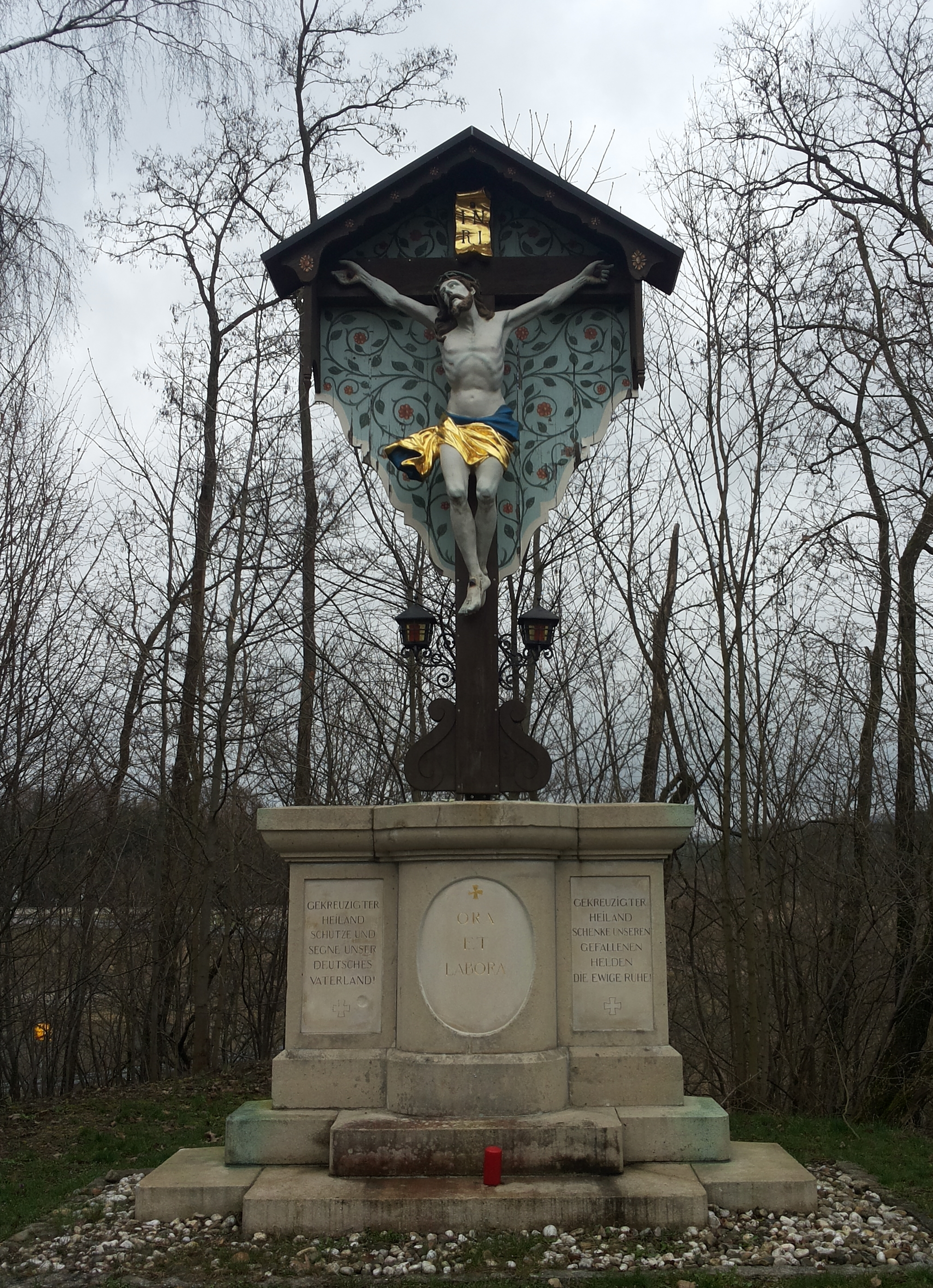 Grubenkreuz in Wackersdorf